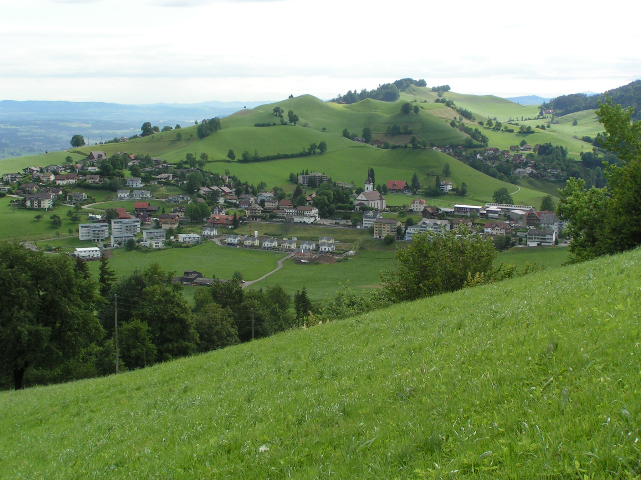 Blick von Arnen auf den Dorfkern Schwarzenberg, hinten der Dorfteil Sonnenrain